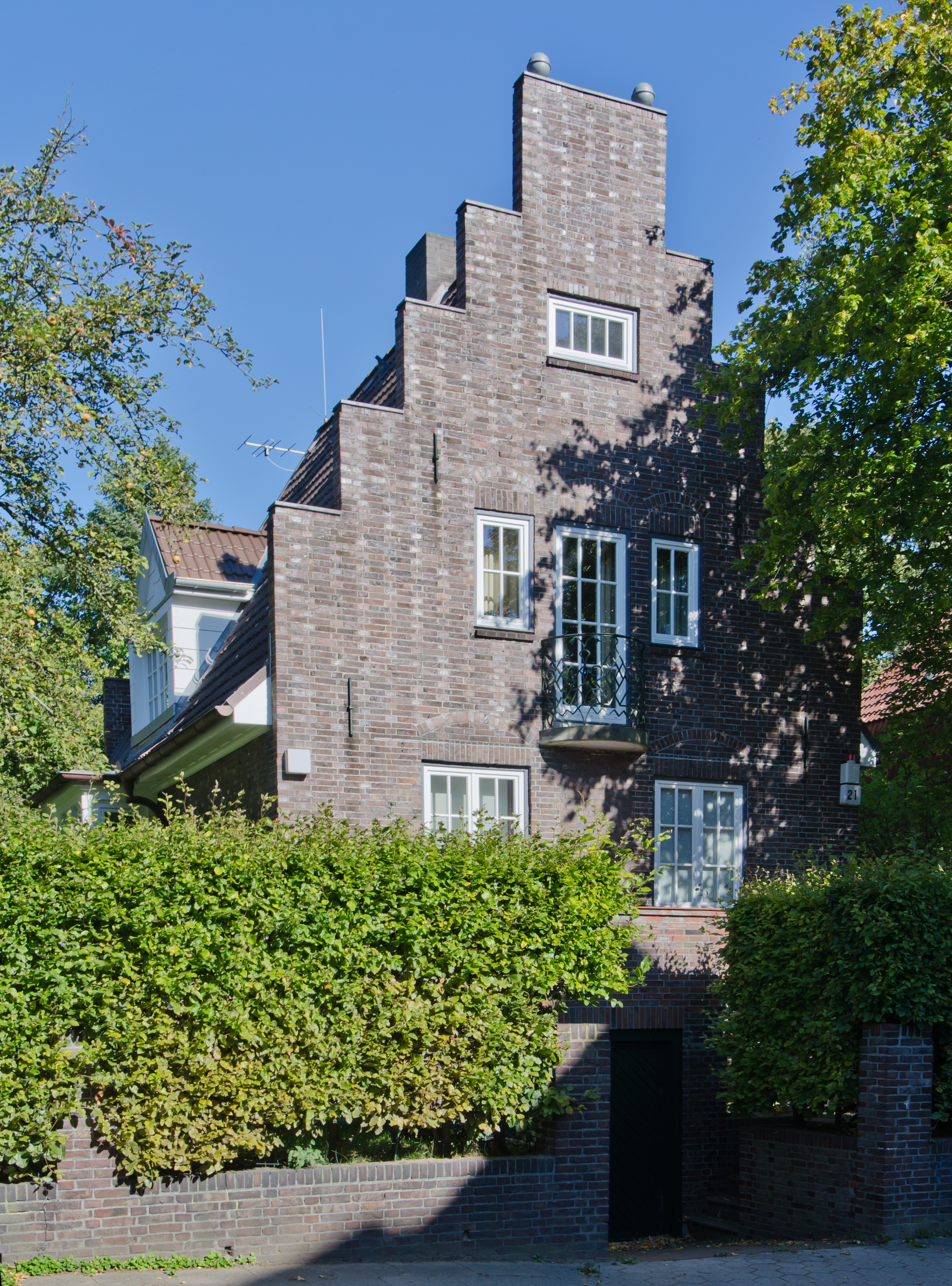 von Camillo Güther entworfenes und bewohntes Haus in HH-Groß Flottbek